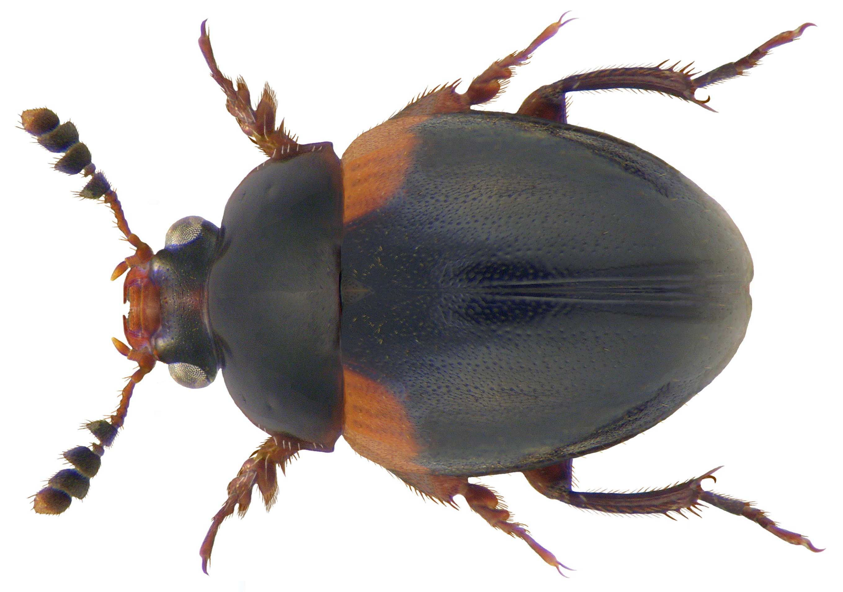 Familie: Leiodidae Groesse: 2,7-4 mm Verbreitung: Europa, Kleinasien Ökologie: an Baumschwämmen, unter Rinde, in verpilztem Holz Fundort: Germania, Bayern, Oberfranken, Kulmbach leg.det. U.Schmidt, 1981 Foto: U.Schmidt, 2009